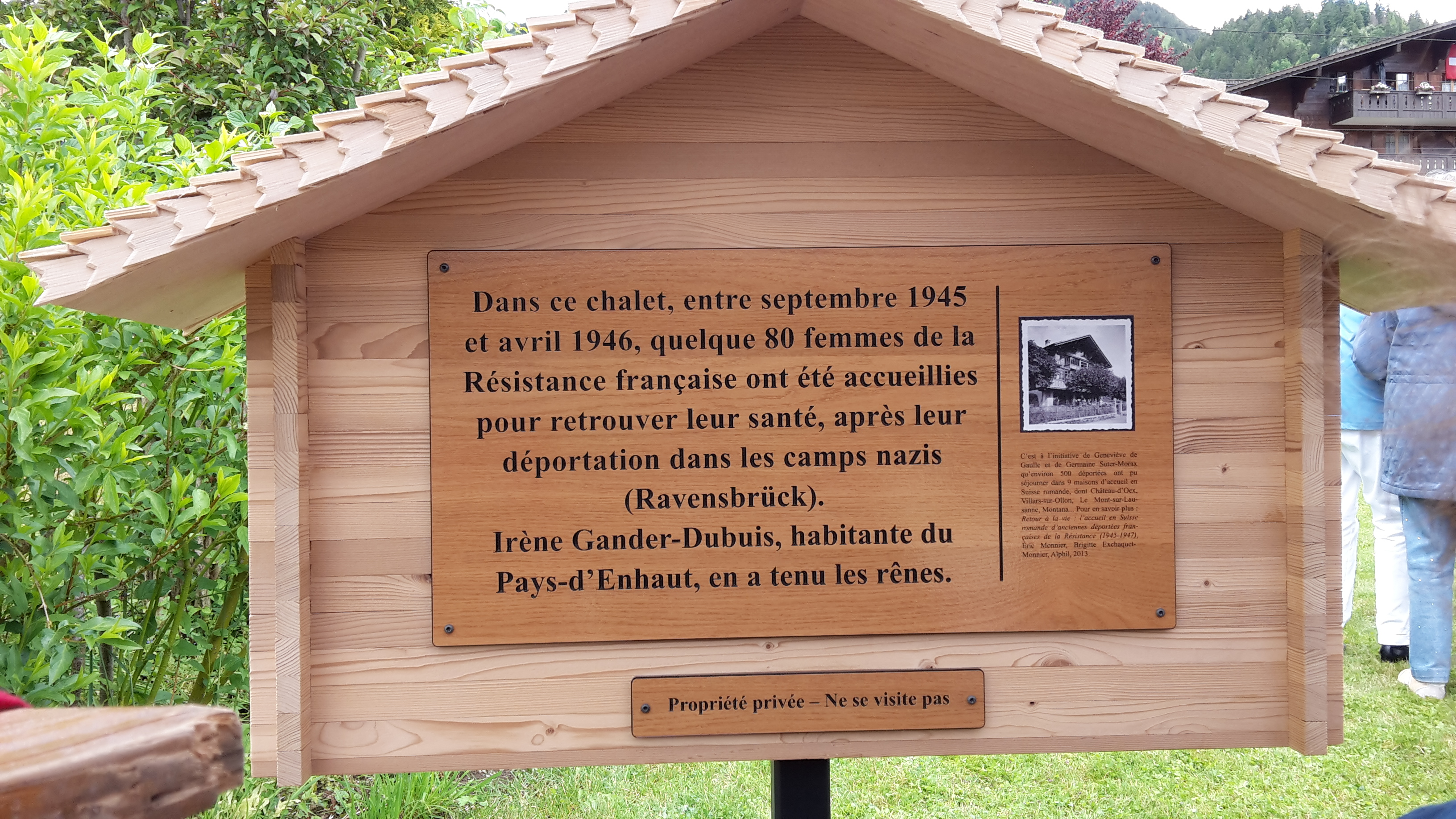 Plaque commémorative dévoilée le 15 juin 2016, par Noëlla Rouget.